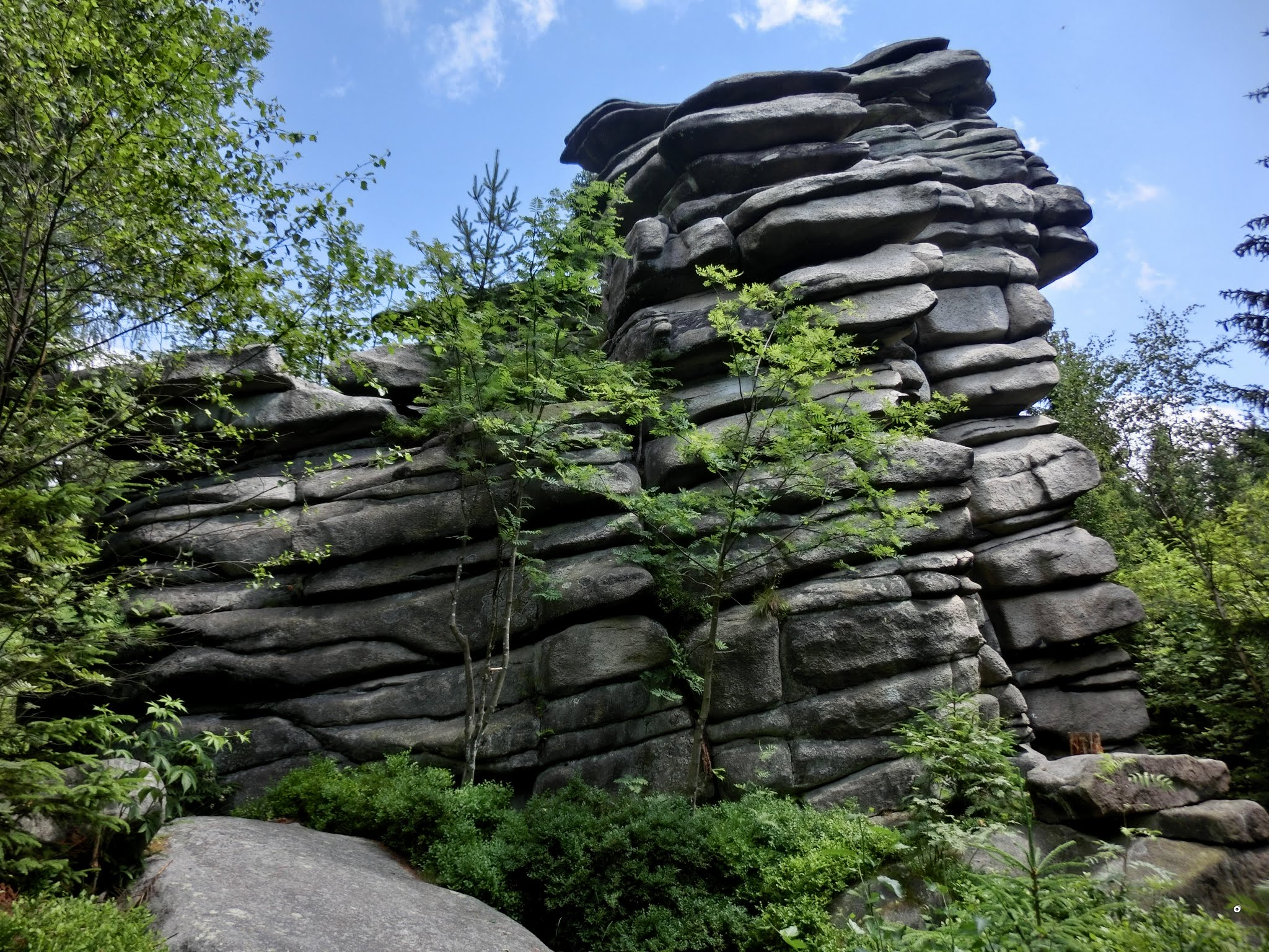 Einer der "Drei Brüder"